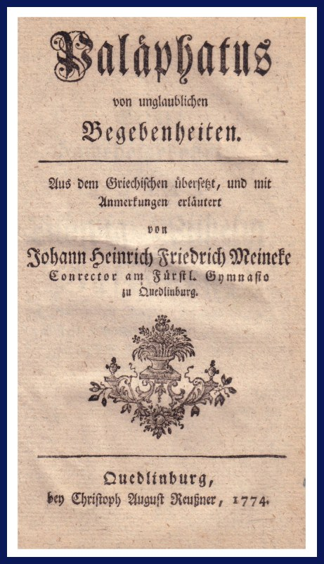 Titelseite von Johann Heinrich Friedrich Meineke, „Palaephatus von unglaublichen Begebenheiten“. Quedlinburg bey Christoph August Reußner, 1774